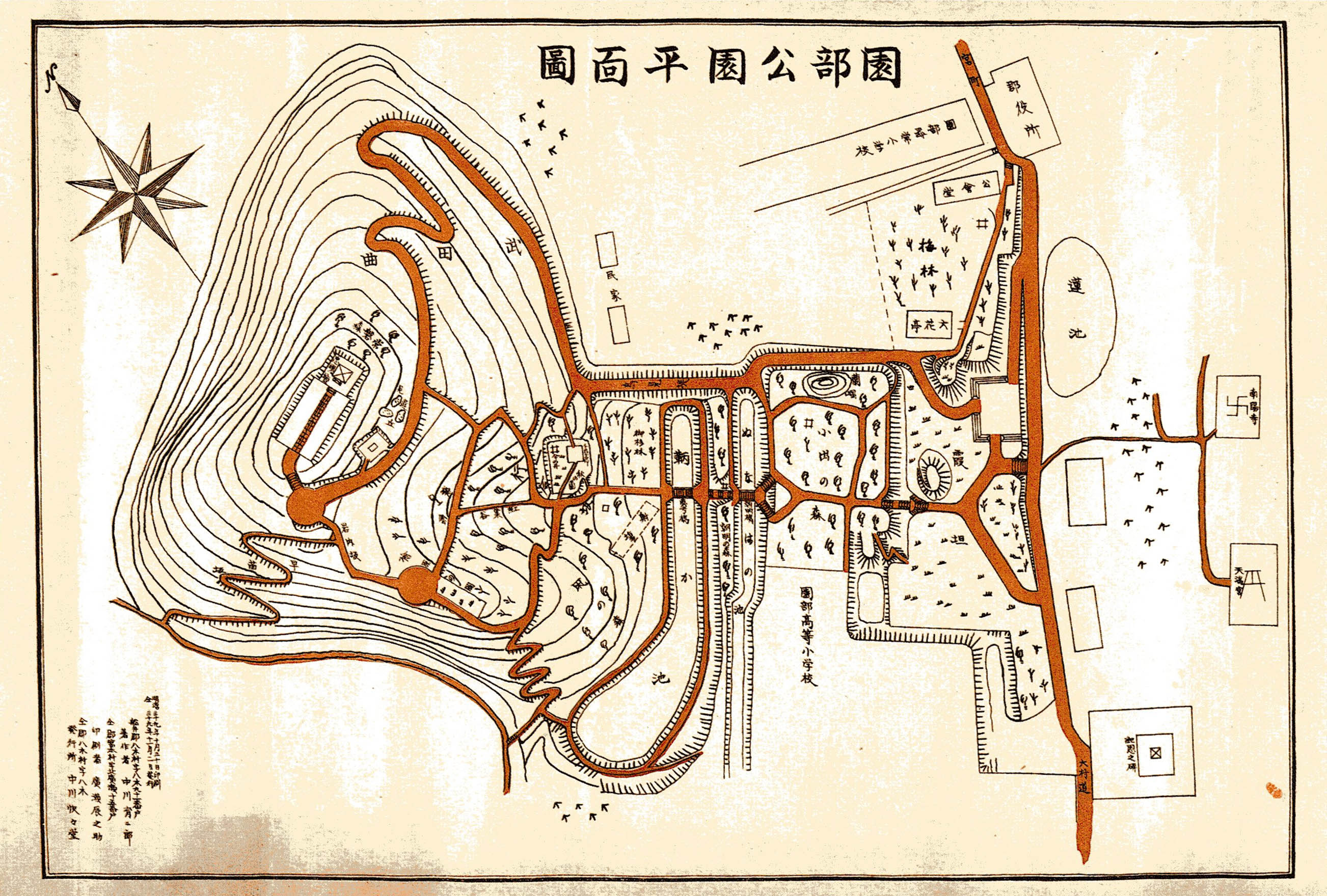 園部公園平面図